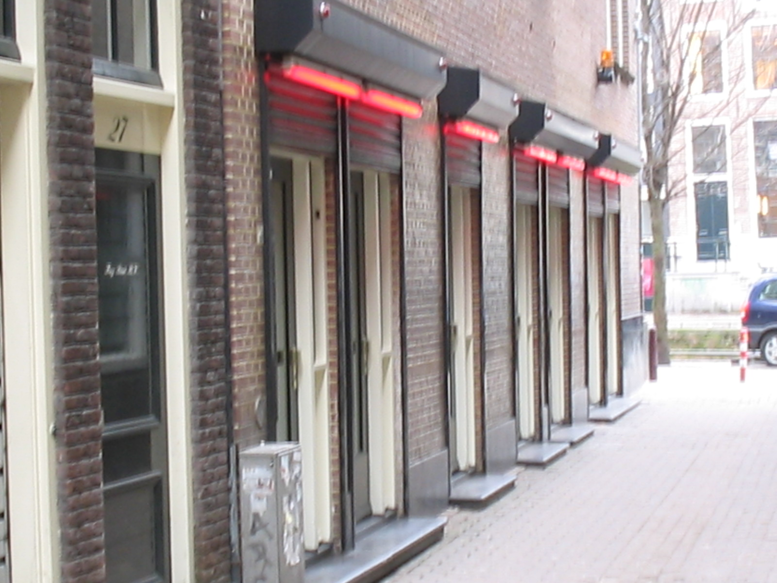 red light in Amsterdam